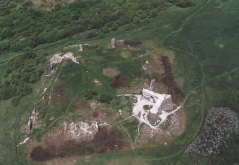 bélyegkép.